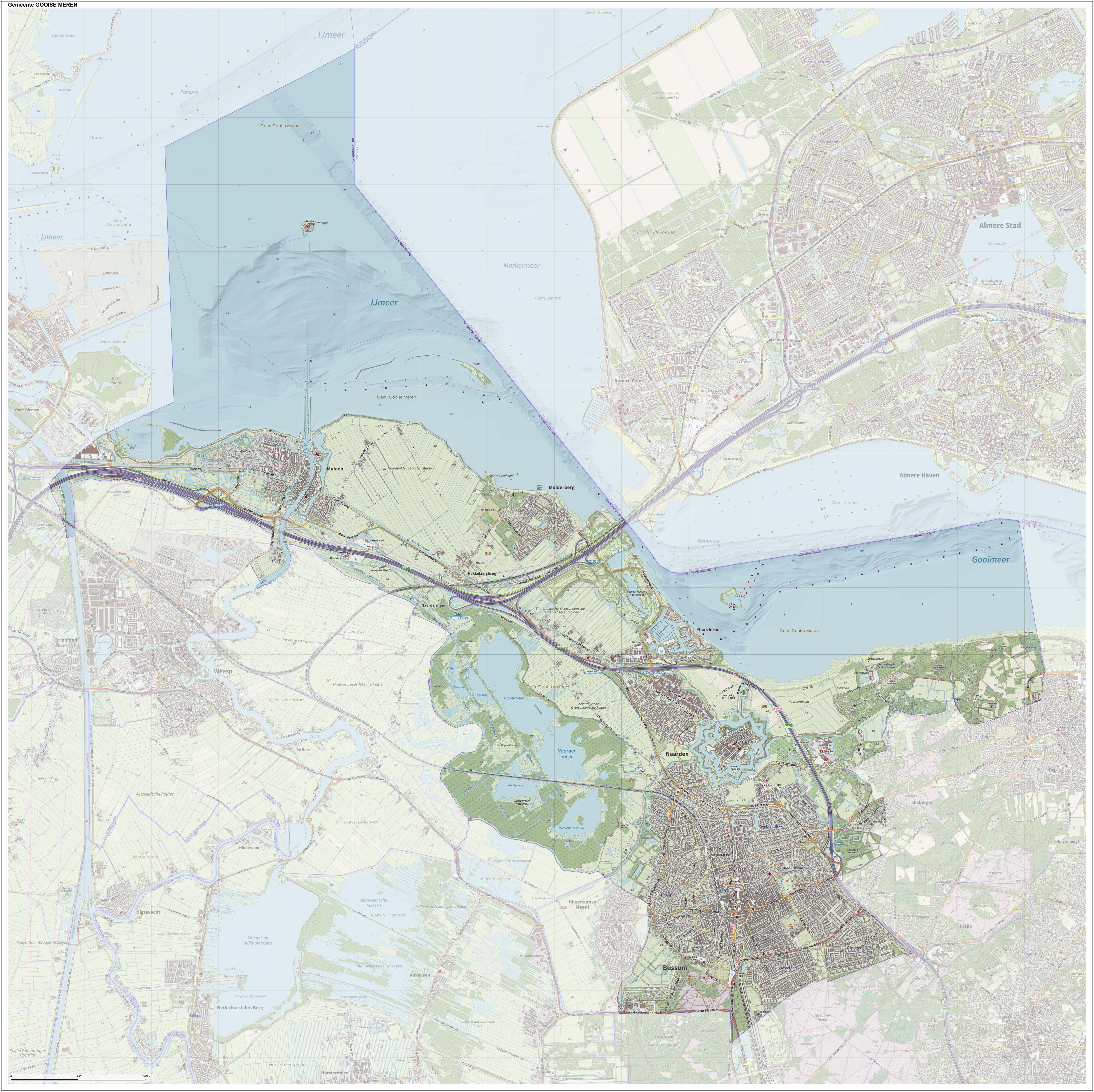 Topografische kaart van gemeente Gooise Meren. Samengesteld door Jan-Willem van Aalst op basis van de GML open geodata van de BRT/Top10NL (basisregistratie Topografie, Kadaster), vrijgegeven door Kadaster onder de Creative Commons BY licentie. Additionele gegevens uit BAG uit de Open Street Map en uit de Risicokaart. Zie ook de Legenda.